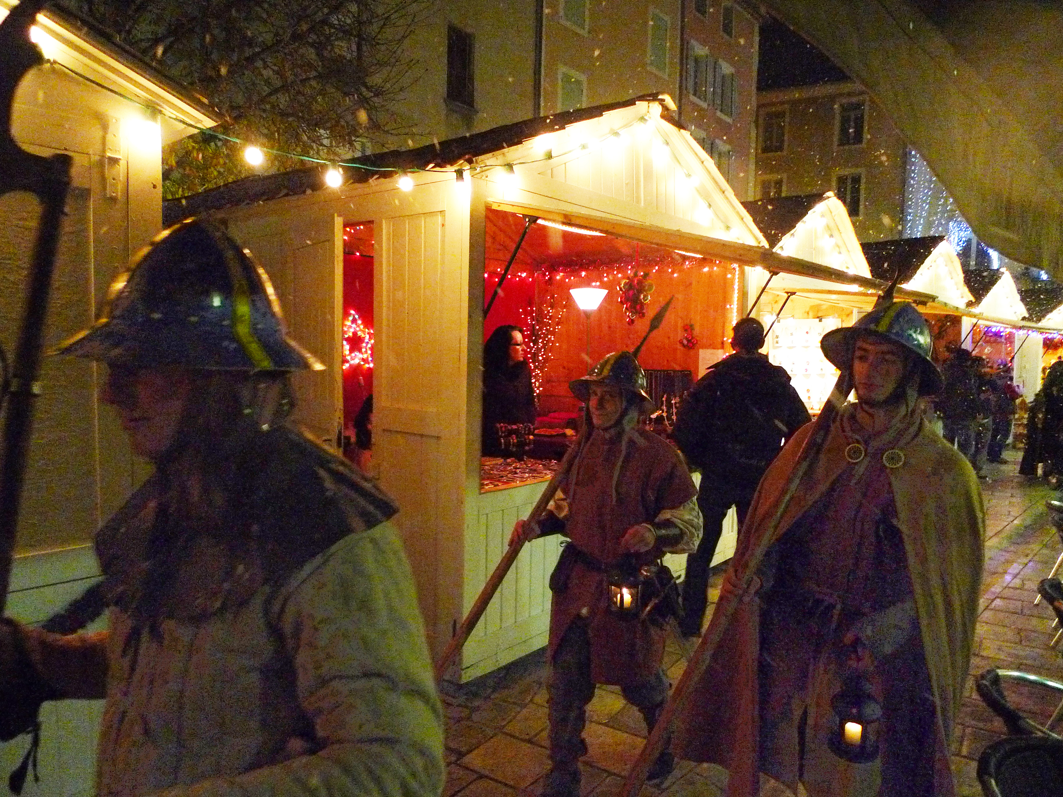 Les gardes de nuit au marché de Noël à Orange